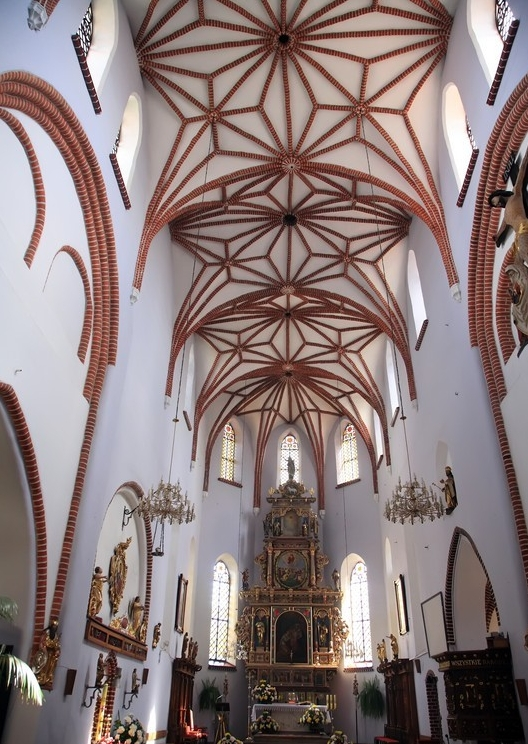 Bartoszyce - miasto w woj. warmińsko-mazurskim, w powiecie bartoszyckim. Kościół św. Jana Ewangelisty i Matki Boskiej Częstochowskiej